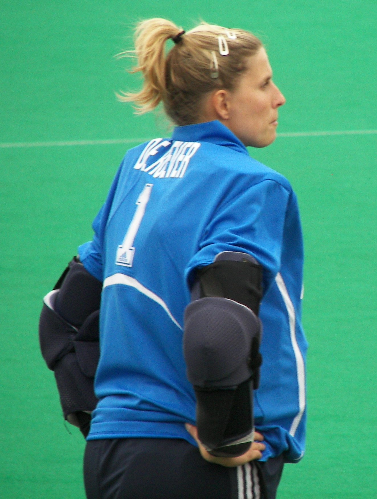 Lisanne de Roever im August 2007